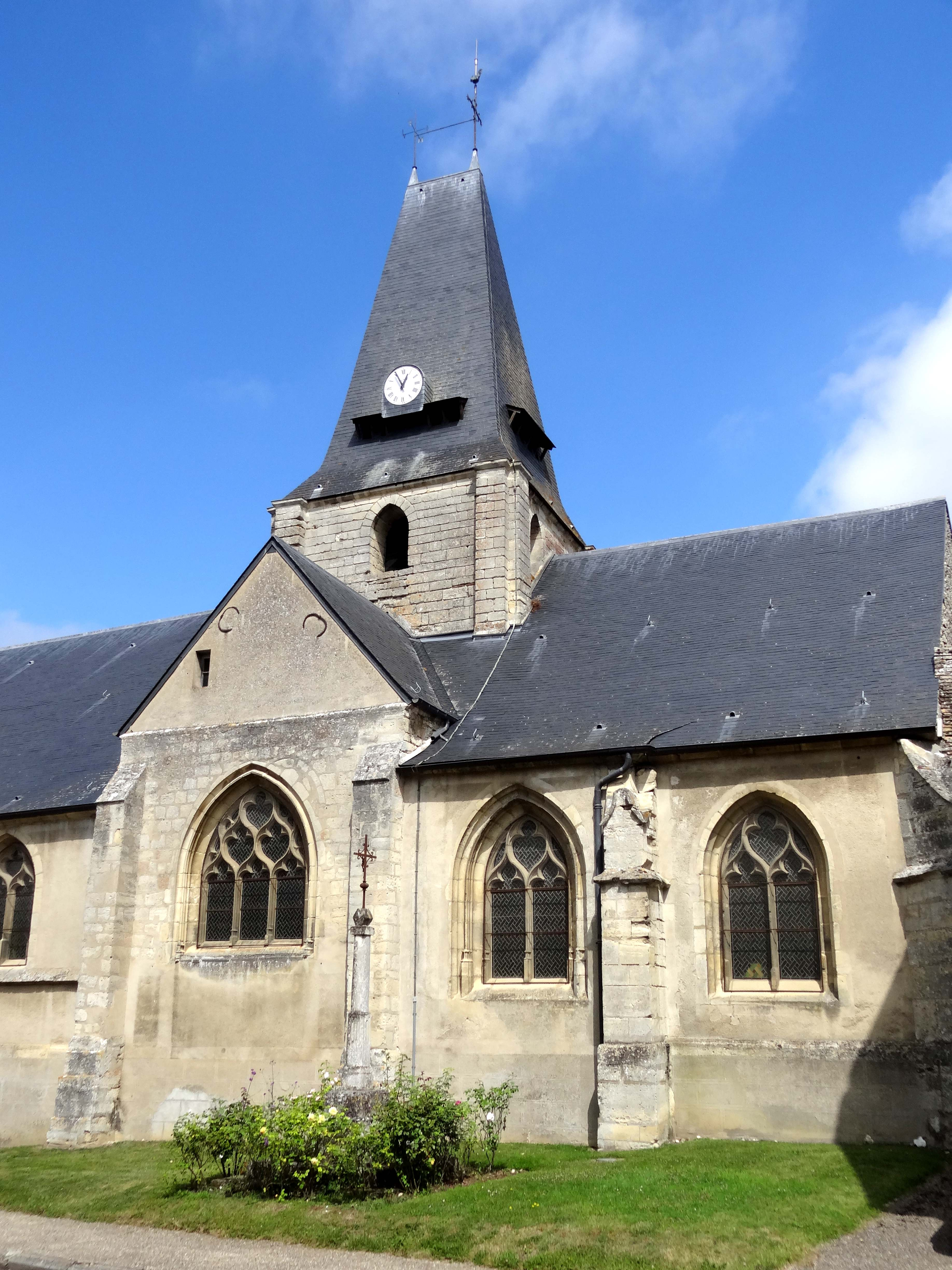 Église Saint-Germain de Boury-en-Vexin - voir titre.